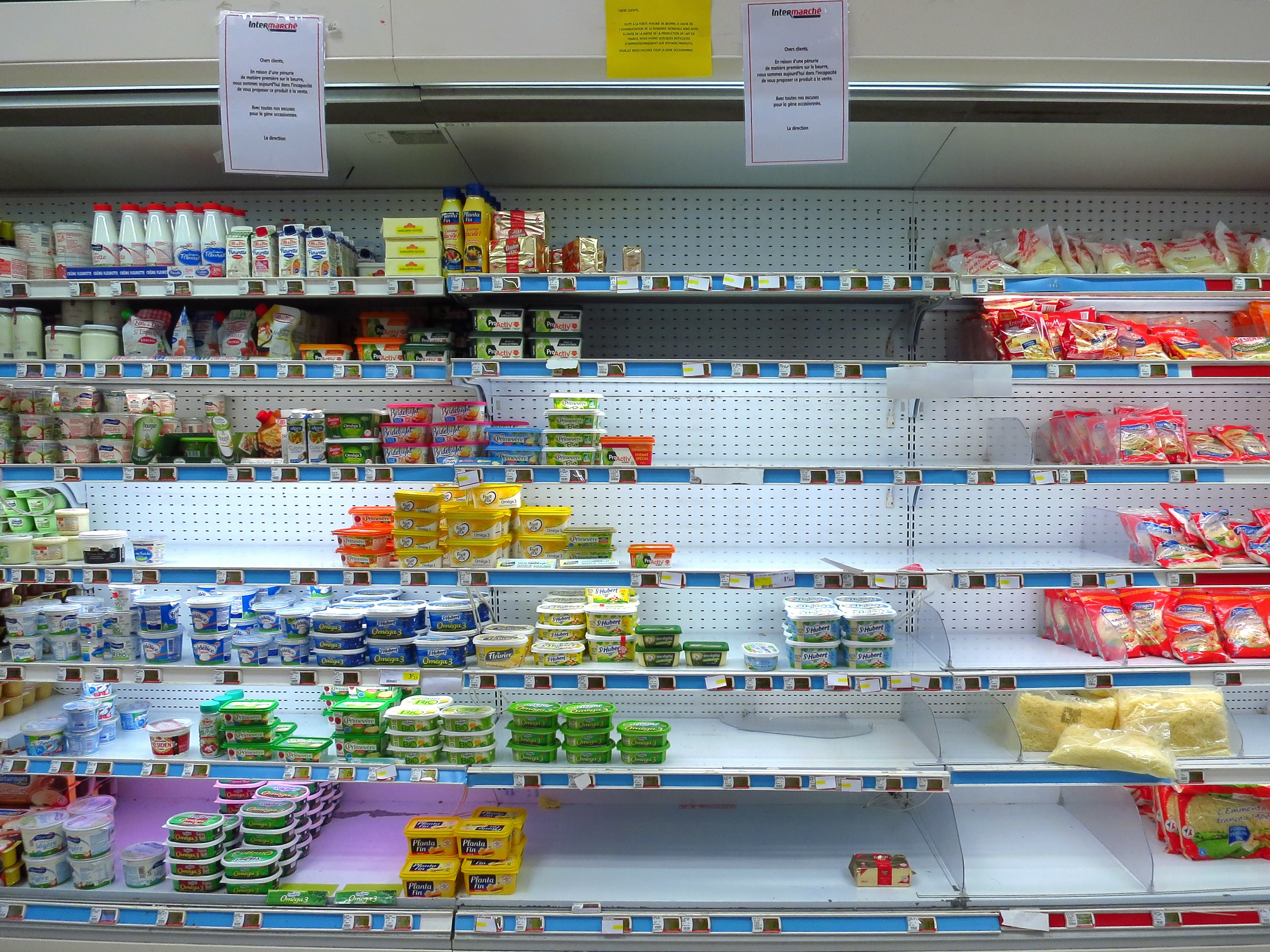 Saint-Lizier (Ariège, France) - Intermarché Super - Le Pont du Baup - Gondoles pendant la Crise du Beurre.